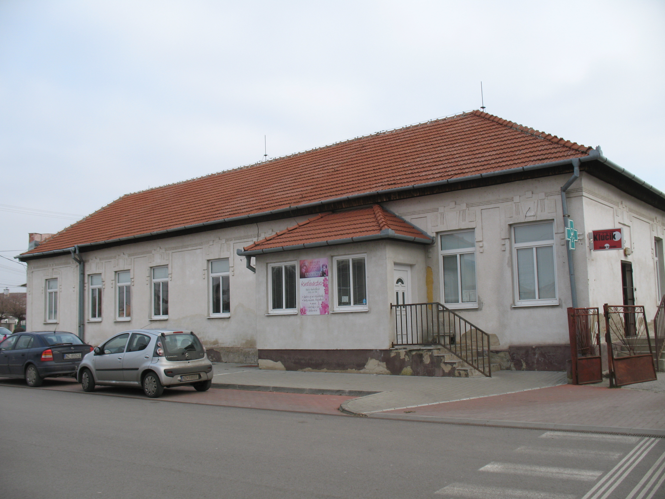 Bánkeszi